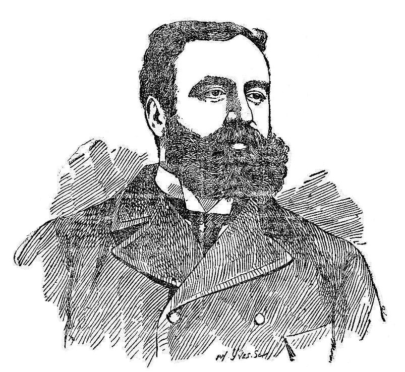 "M. René Gautier".